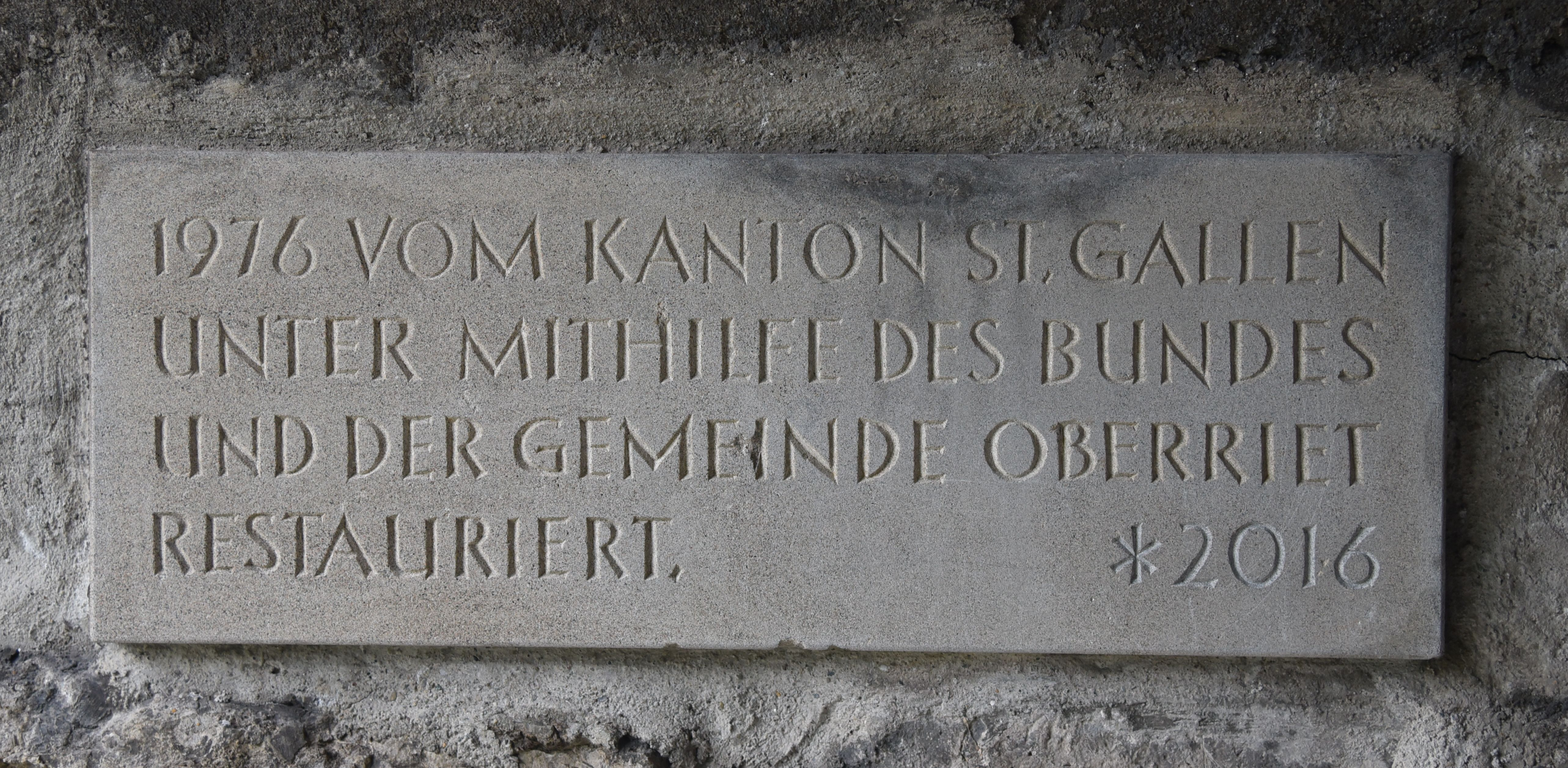 Tafel an der Burg Blatten in Kobelwald SG.